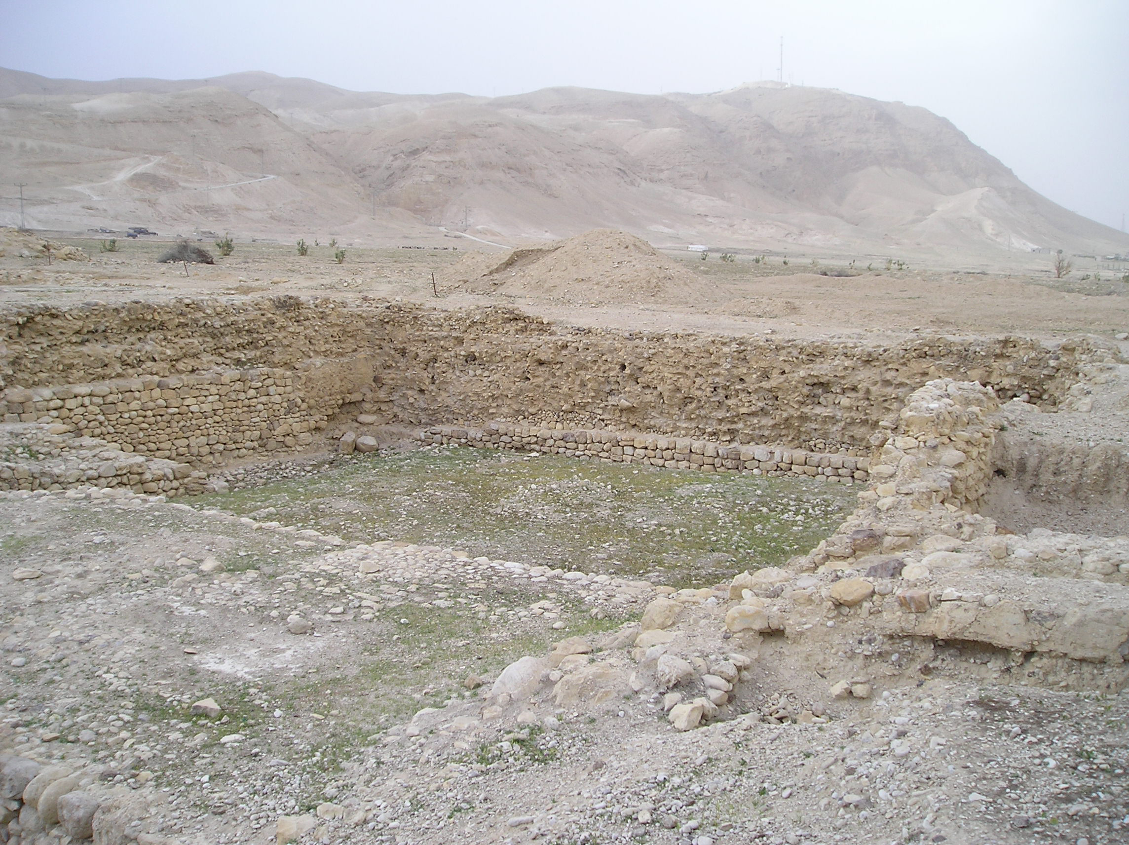 Podwójny zbiornik na wodę z czasów Aleksandra Jannaja (103-76 przed Chr.). Strefa wykopalisk na Tulul Abu el-Alayiq. Jerycho z czasów Hasmoneuszy i Heroda Wielkiego (od II w. przed Chr. do I w. po Chr.). Prace prowadzili: C. Warren - 1868, E. Sellin, C. Watzinger - 1909 e 1911, J. Kelso, D. Baramki, J. Pritchard - 1950-1951, G. Foerster e E. Netzer - 1973-1983 oraz 1986-1988. Badania trwają po dziś dzień. Zdjęcie wykonał A. Sobkowski dn. 9 marca 2006.